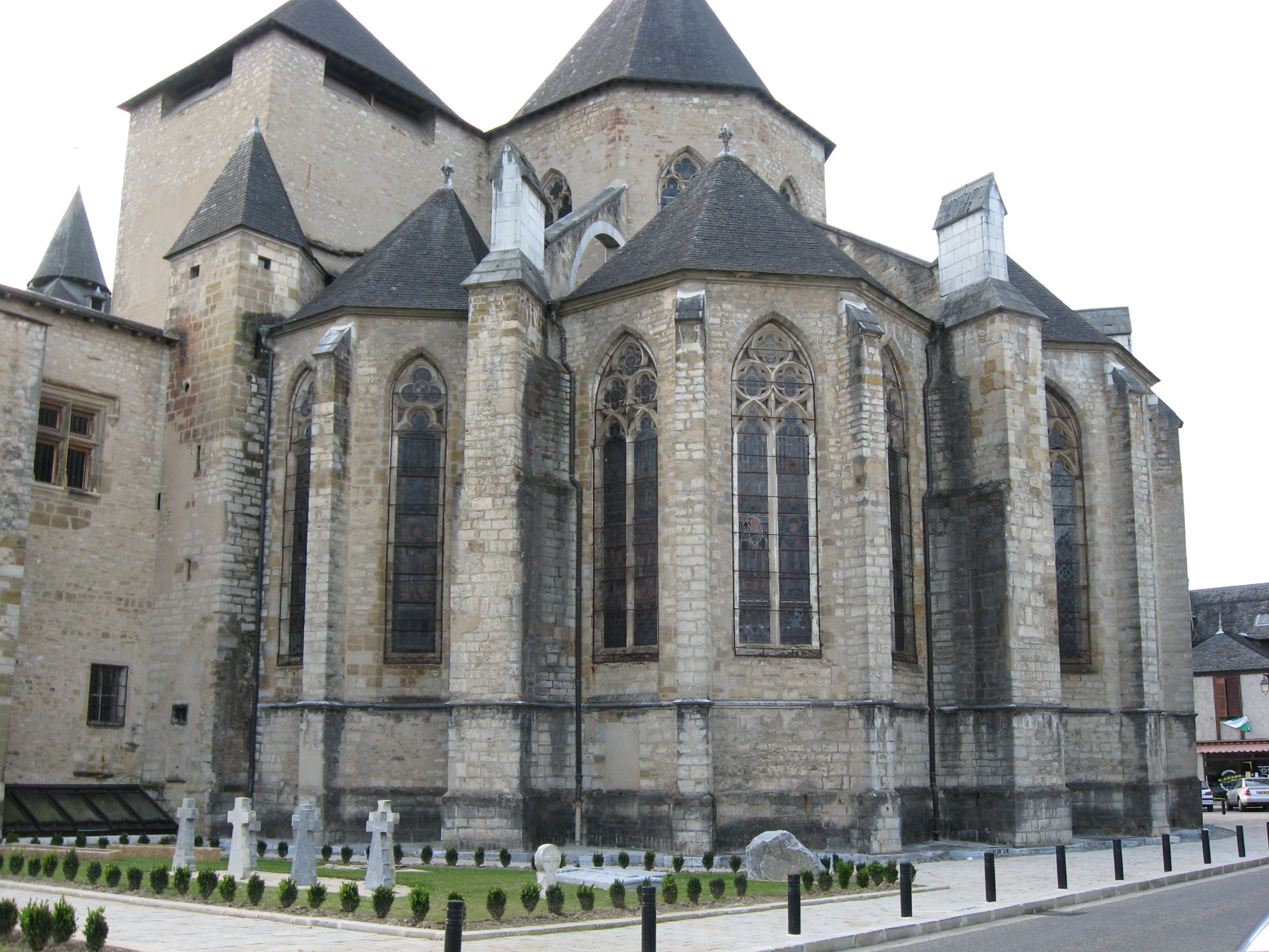 Vue partielle de la Cathédrale Sainte Marie à Oloron Sainte Marie (Pyrénées Atlantiques) Pyrénées).